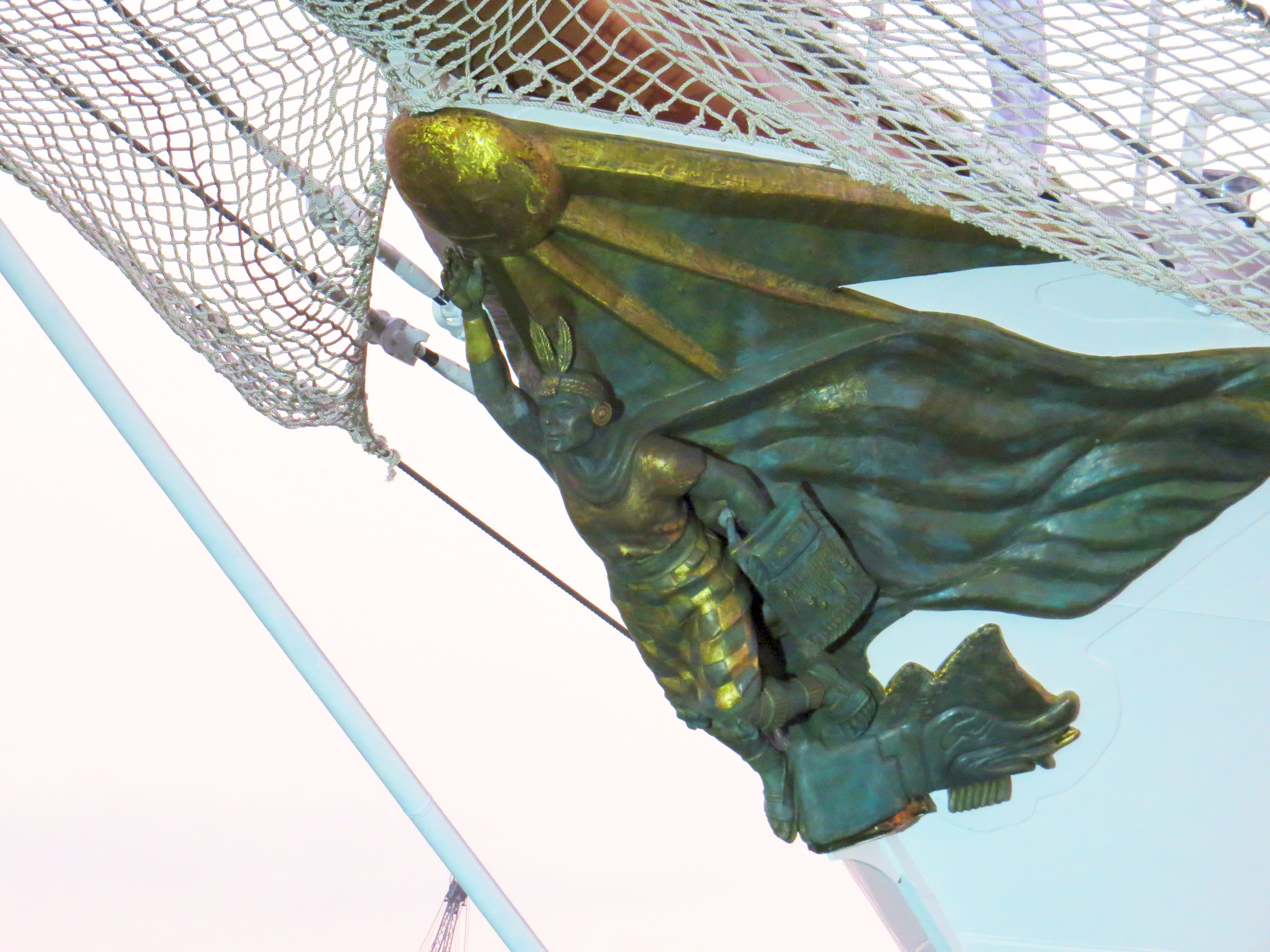 Mascarón de proa del BAP Unión (BEV-161)